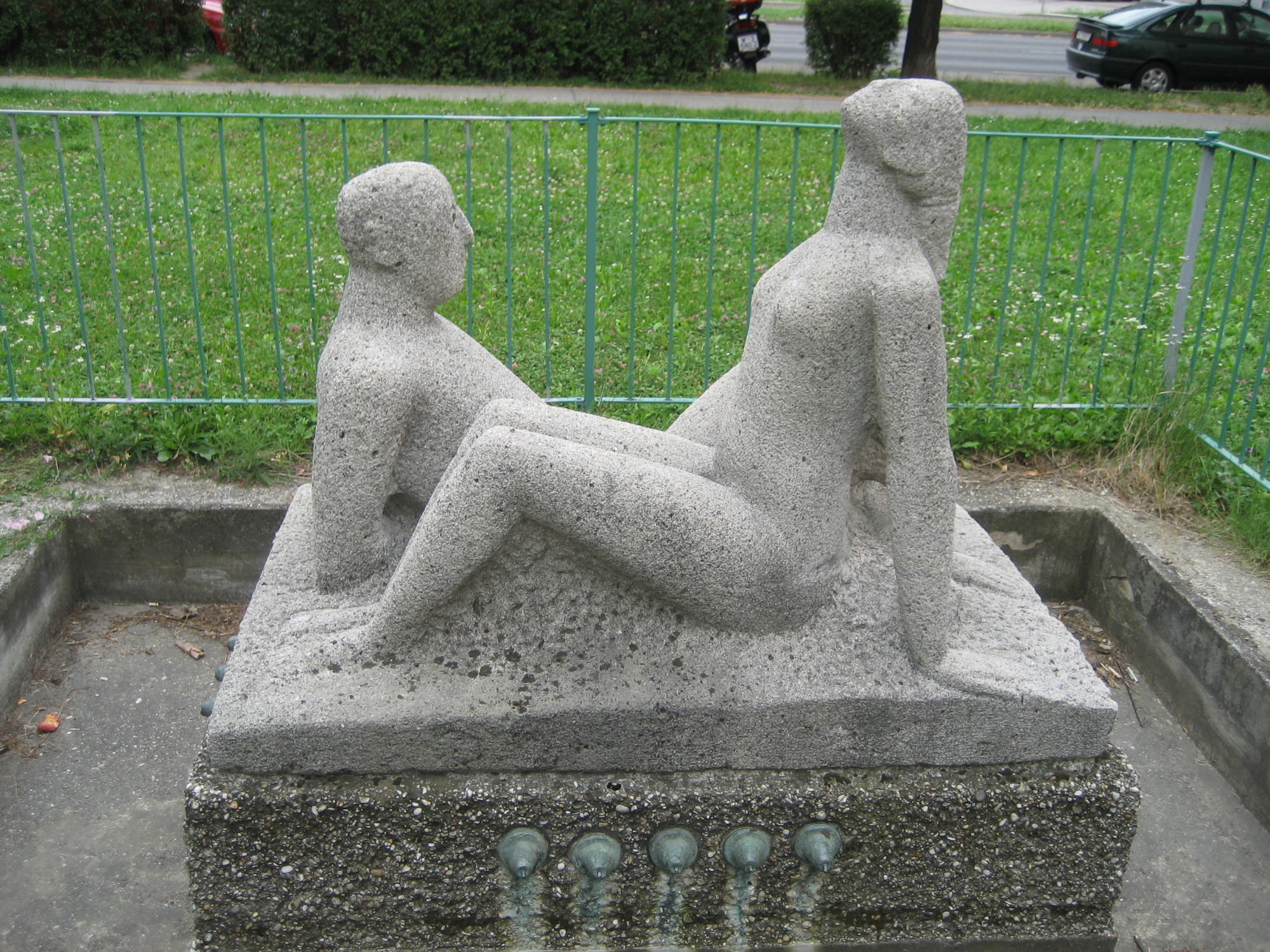 Figur Ruhendes Paar beim Haus Adalbert Stifter Straße 25 in der Brigittenau, in Wien